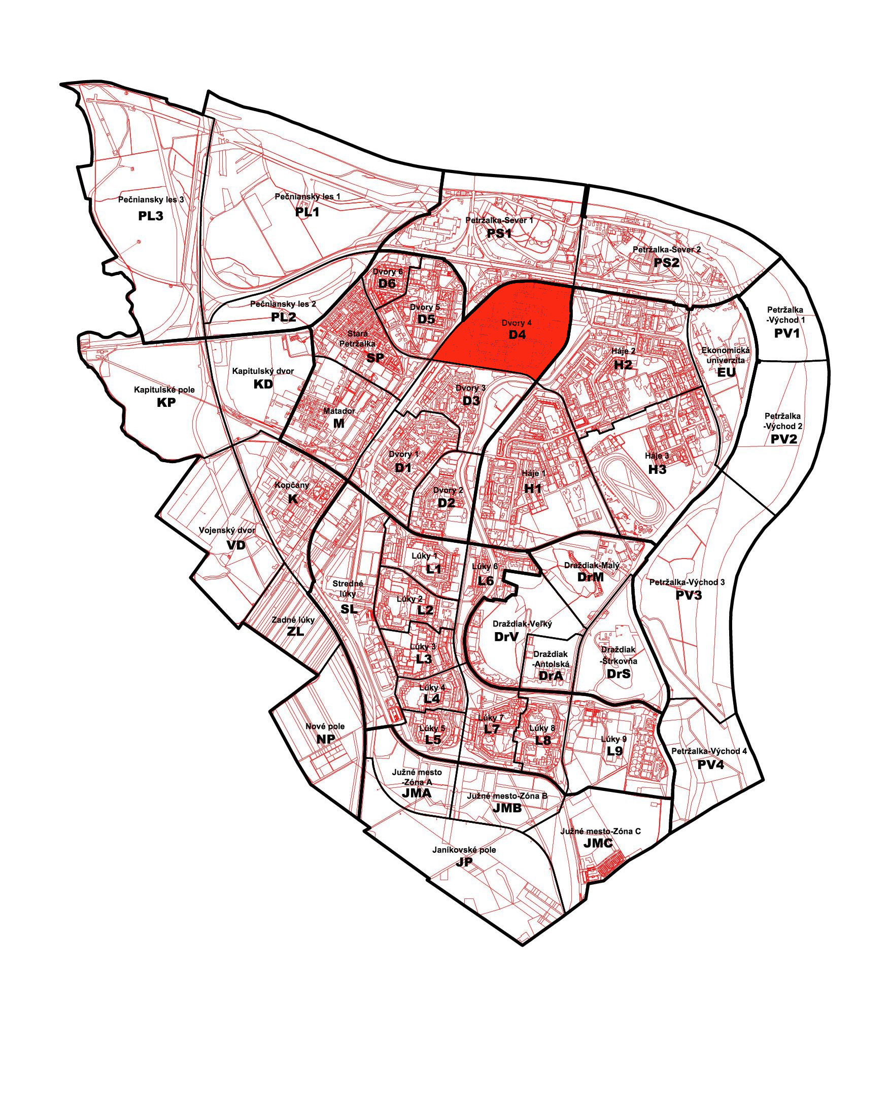 Poloha petržalskej miestnej časti